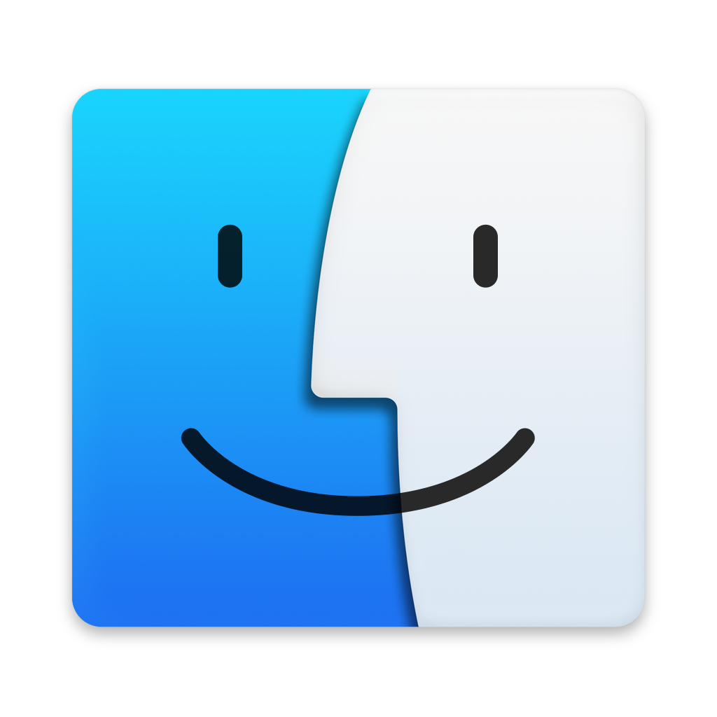 Finder icon